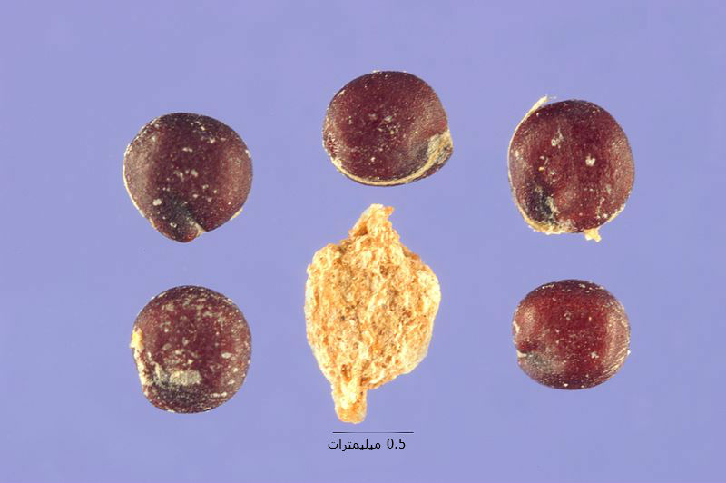 عينات من البزور التي تبيّن أن ببغاوات الدرّة تستسيغها.